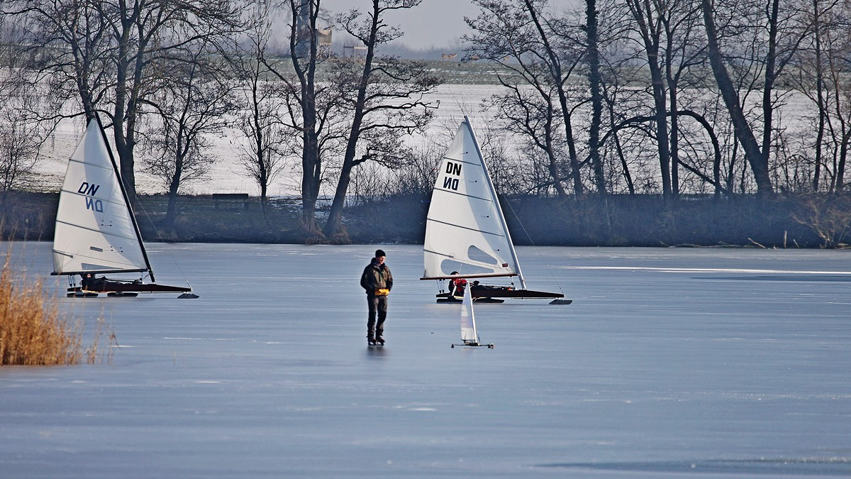 Zwei Eissegler und ein Modelleissegler auf der Müritz